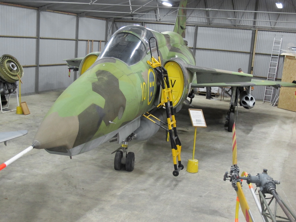 SF 37 Viggen här utställd på Gotlands försvarsmuseum. Individen levererades till Flygvapnet den 26 oktober 1979, och tjänstgjorde vid F 17 (17-56) och F 10 (10-56) tills den kasserades den 11 november 1997.